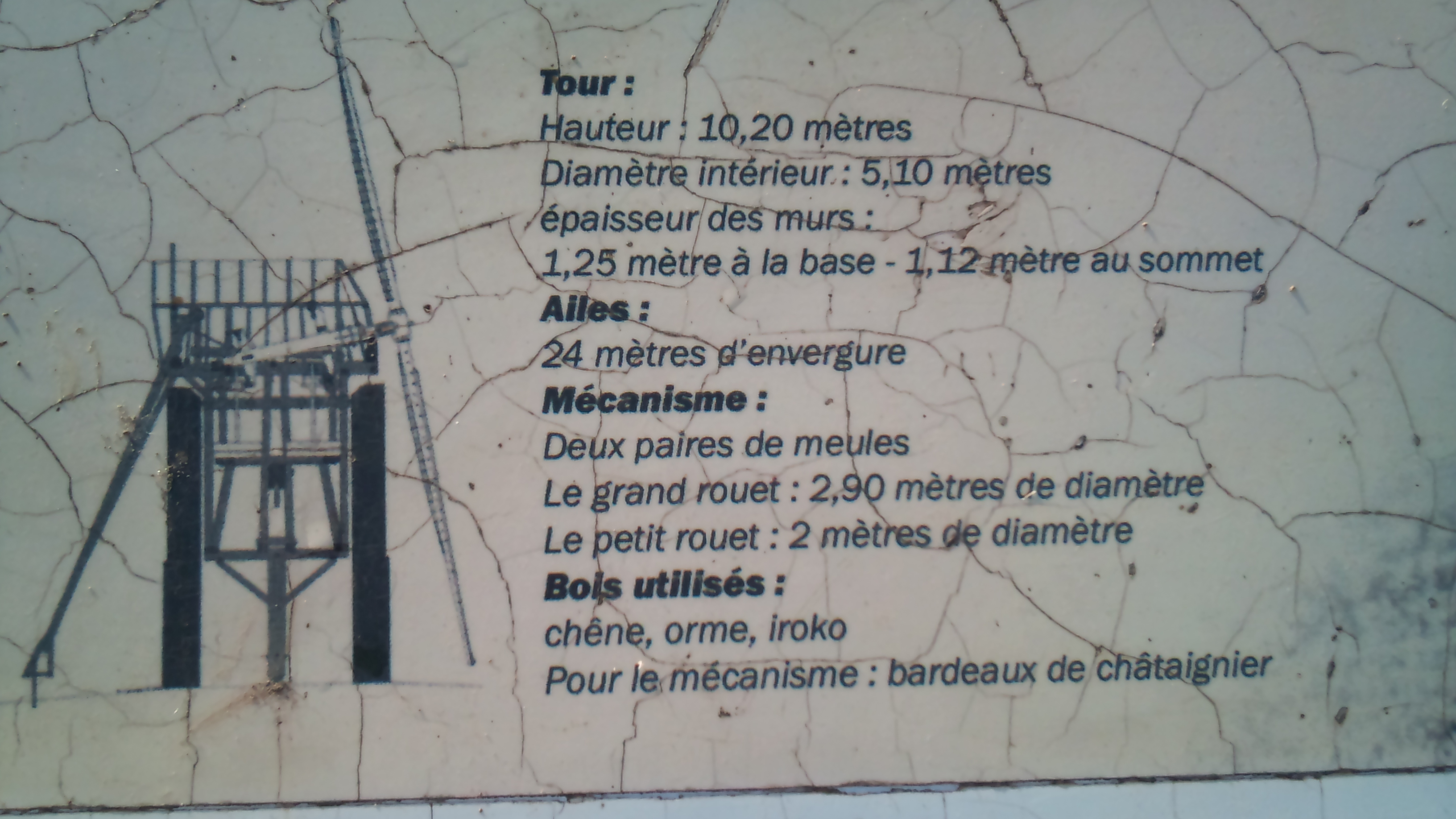 Templeuve - Le Moulin de Vertain